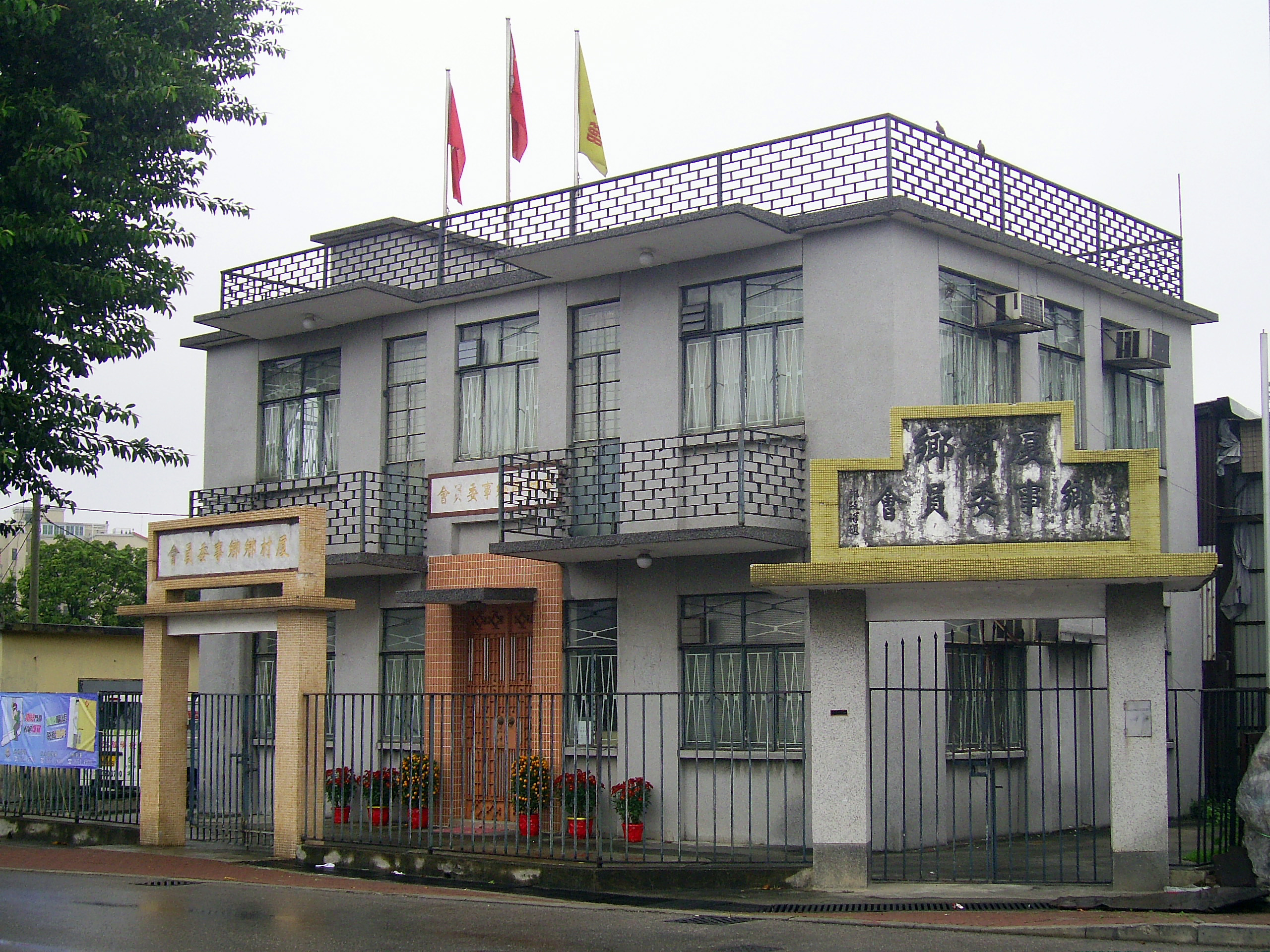 中文（香港）: 廈村鄉鄉事委員